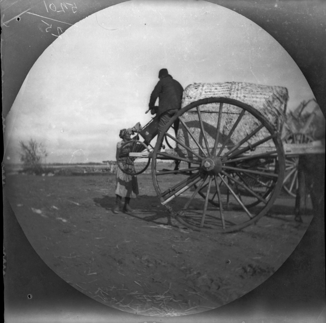 1891. Снимки Туркестана из альбома кругосветного путешествия на велосипедах Томаса Аллена